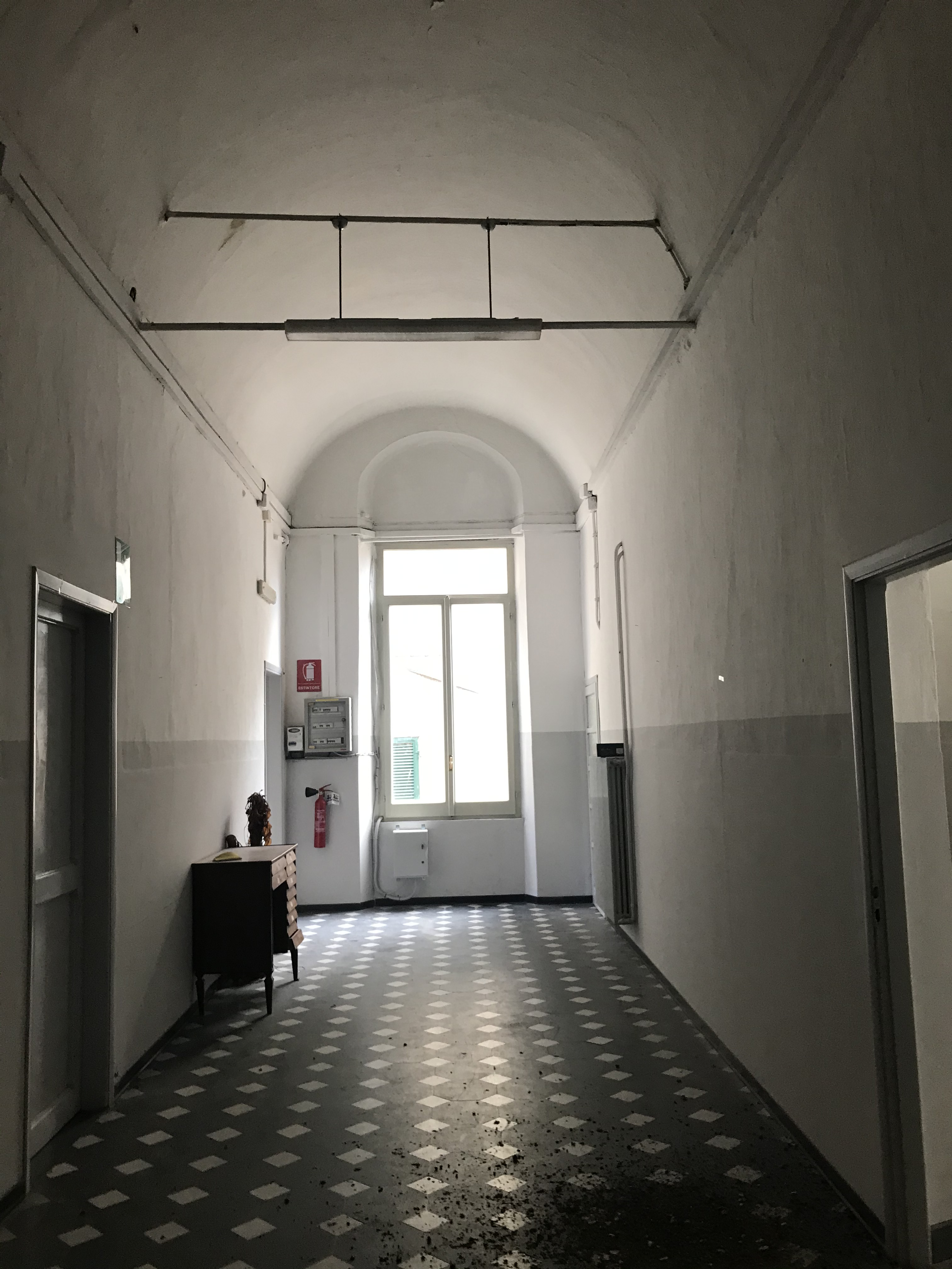 Il corridoio interno che divide le varie aule poste al primo piano di San Domenico